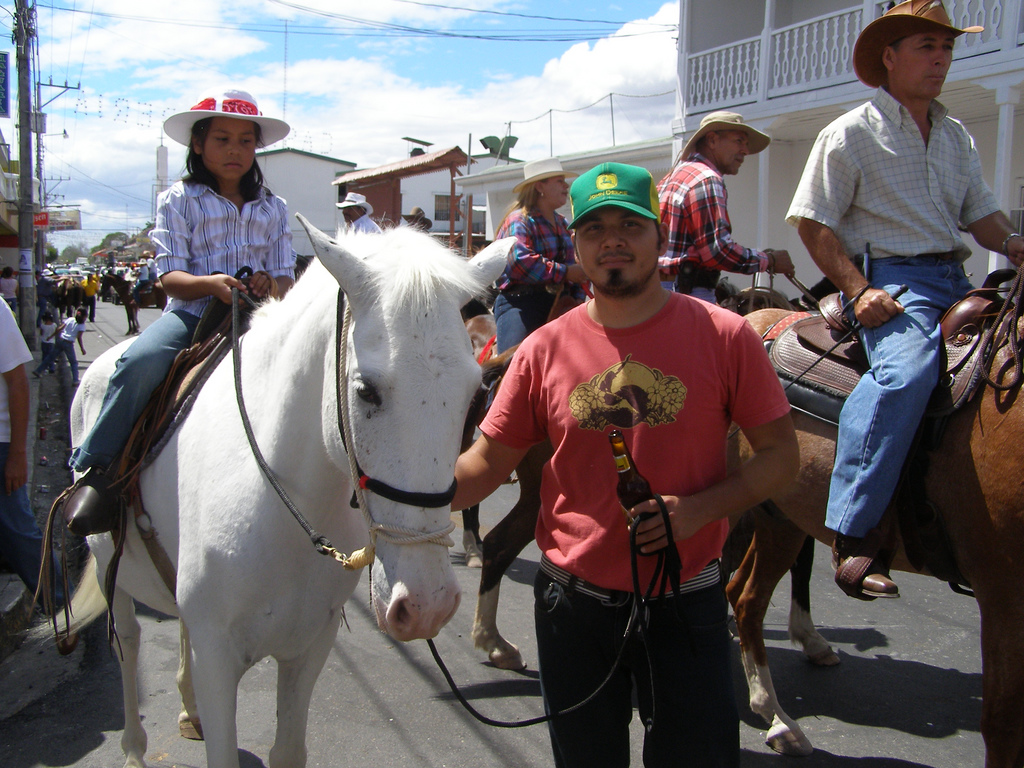 Liberia, Costa Rica festival